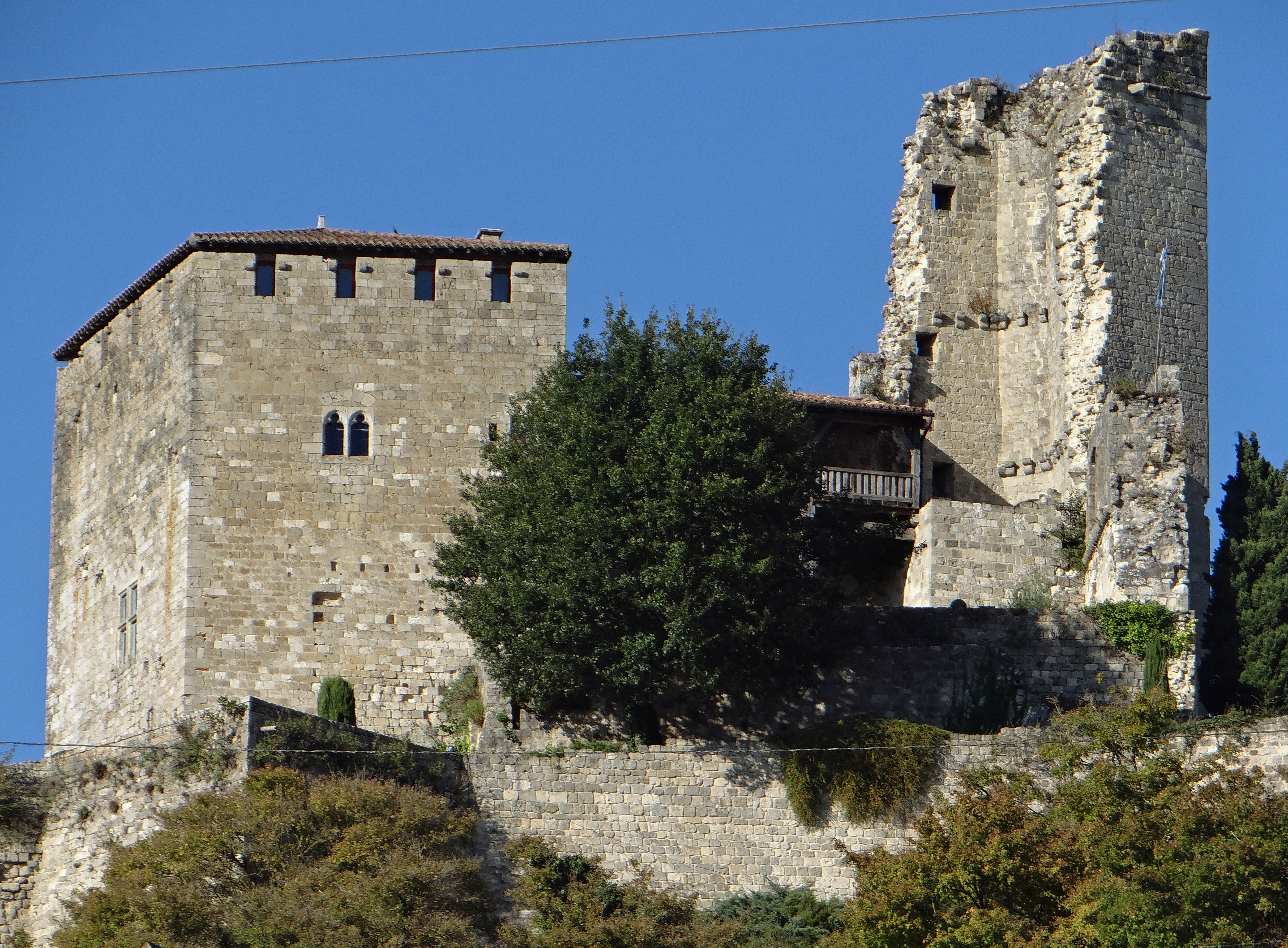 Château de Madaillan